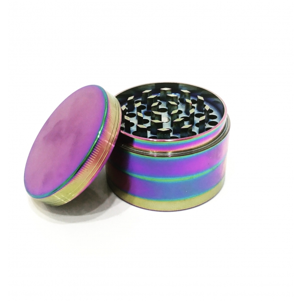 Grinder OIL BIG-1701-B